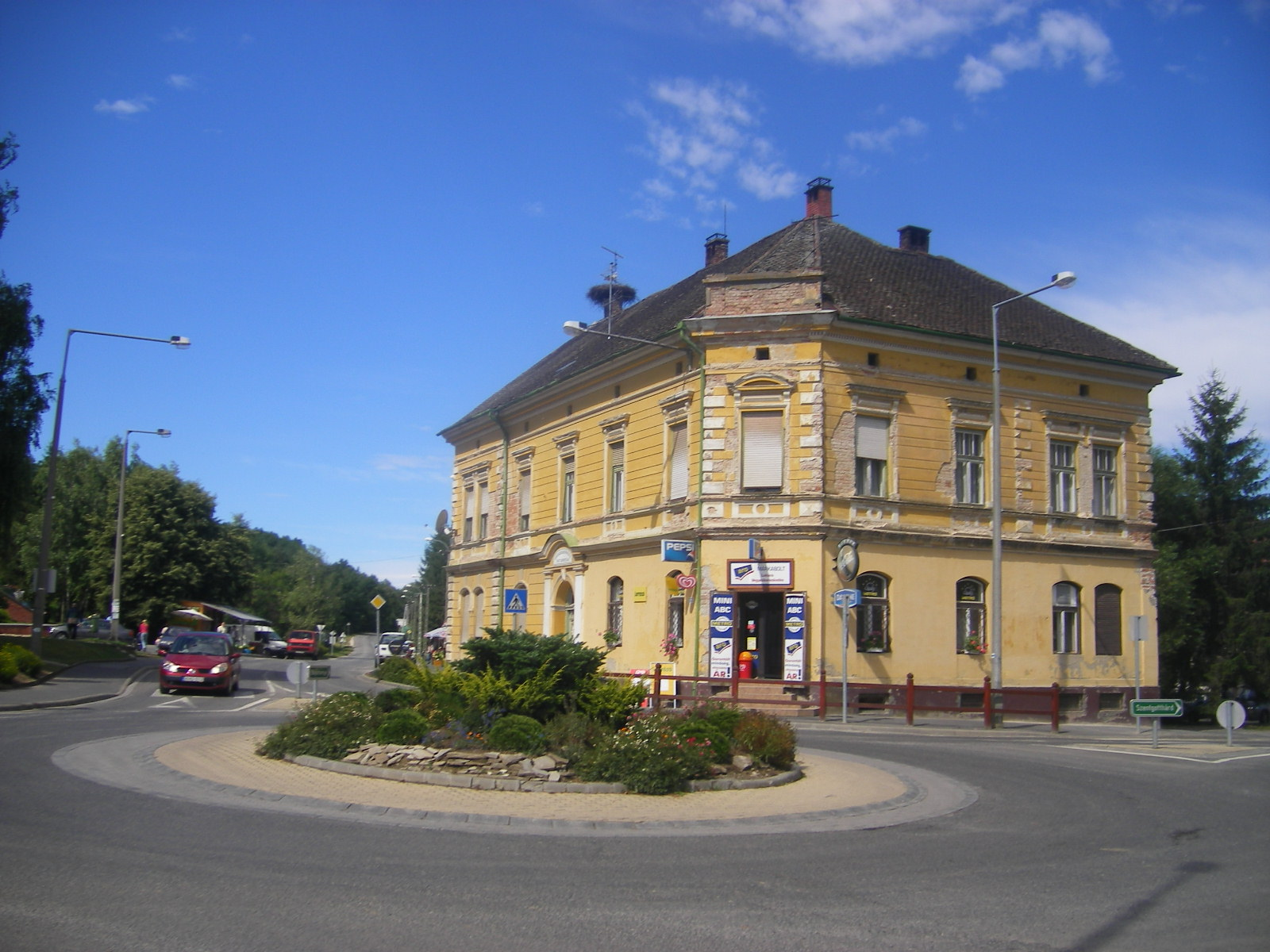 Őriszentpéter